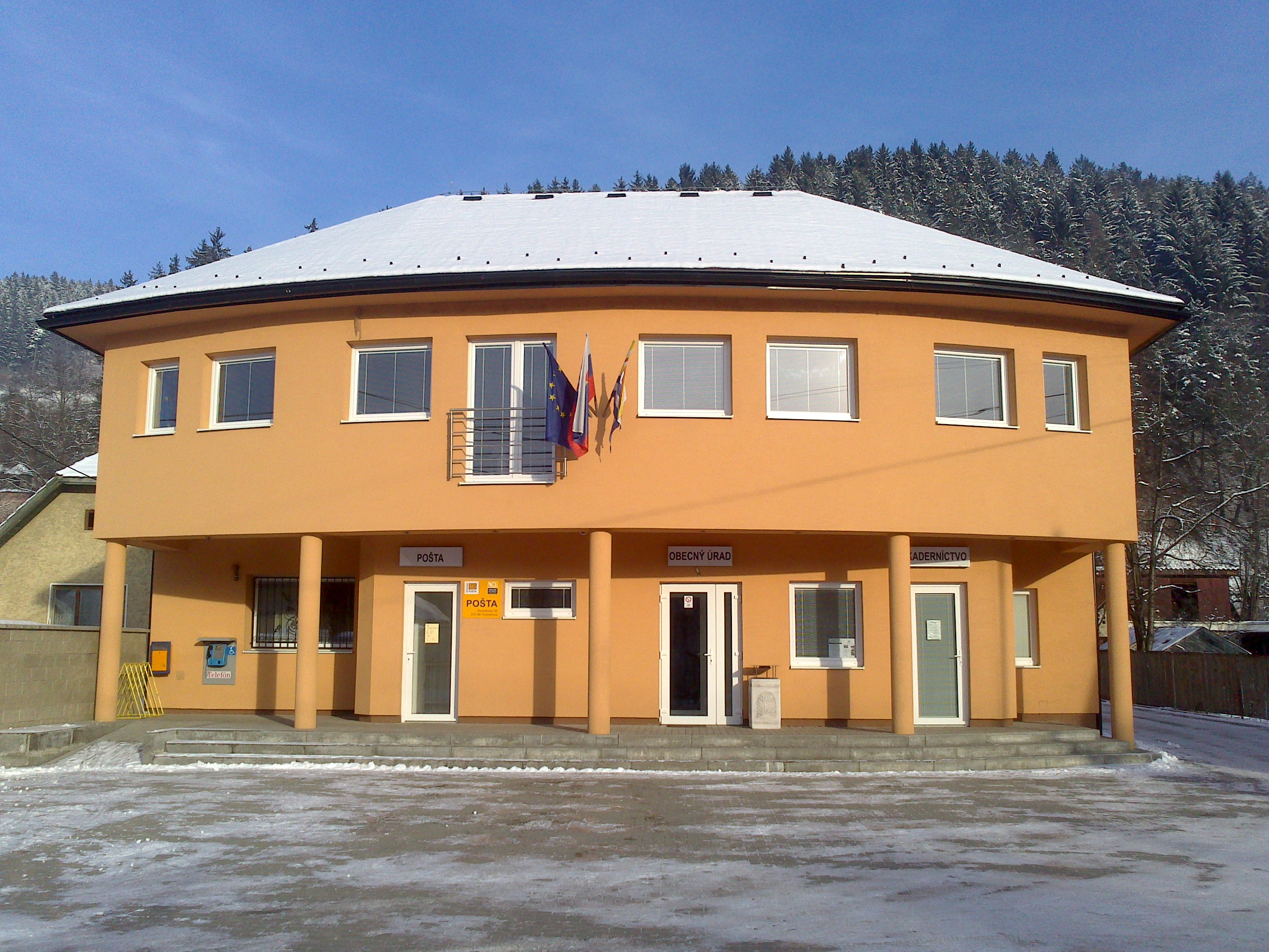 Municipal office Hvozdnica